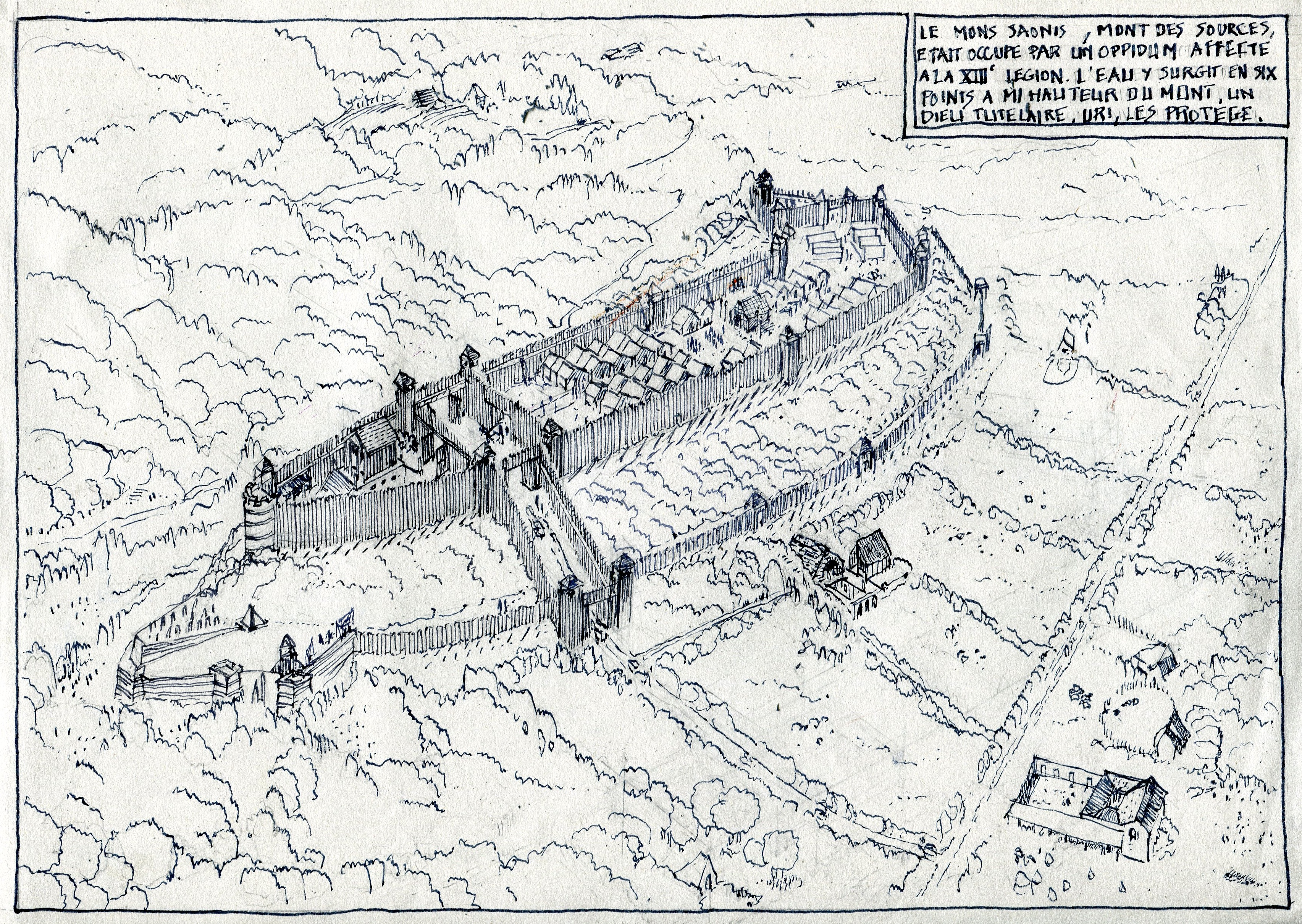 reconstitution de l'oppidum de Montsaon